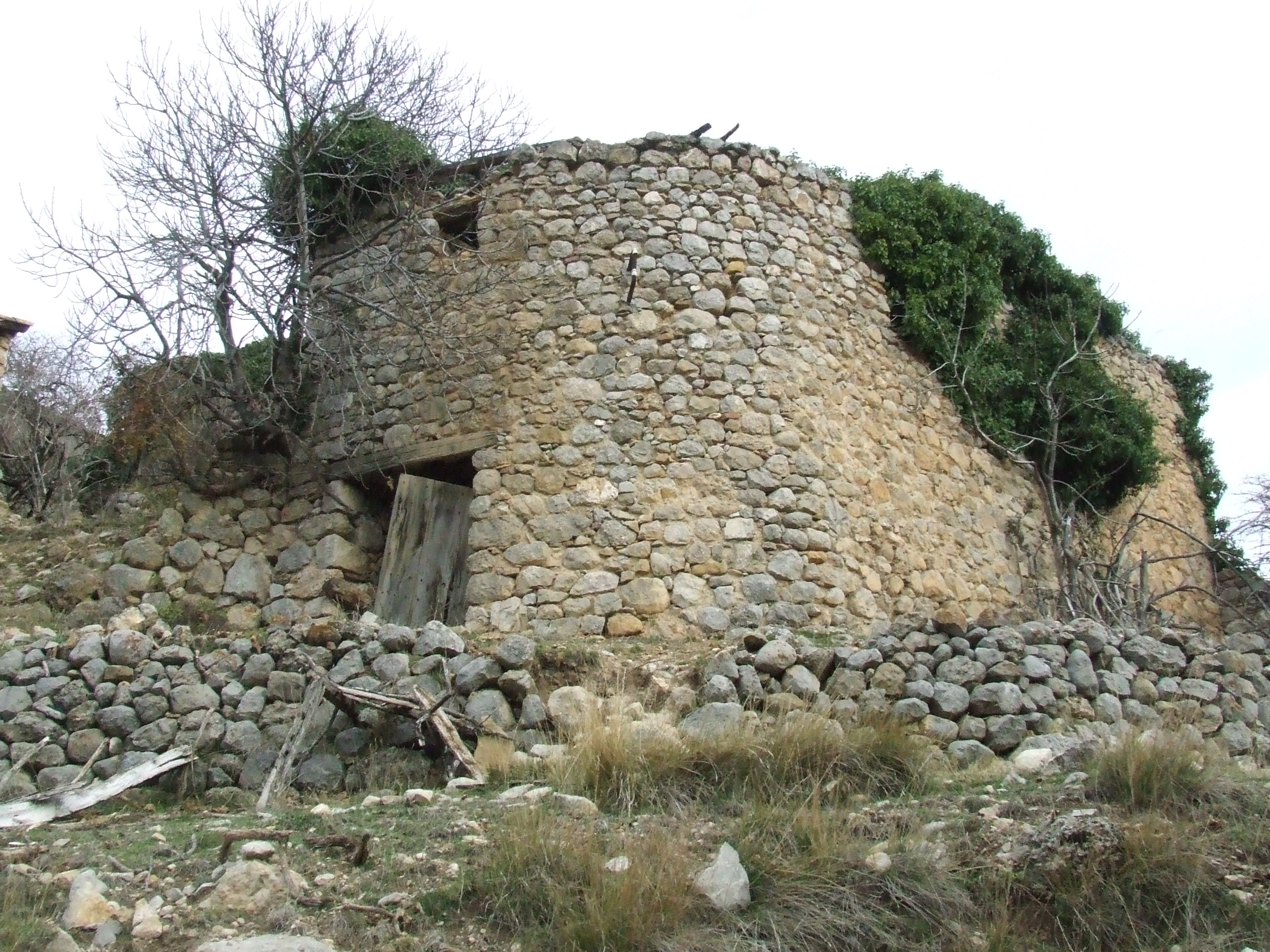 Una casa d'Herba-savina (Hortoneda de la Conca, Conca de Dalt, Pallars Jussà)